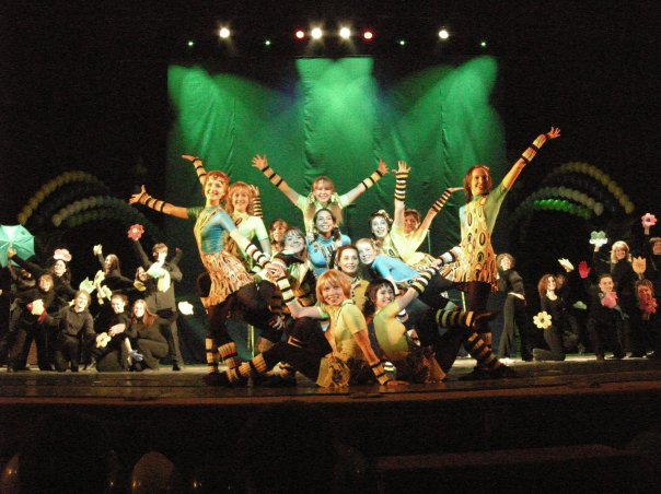 День Университета 2007 "210 лет"